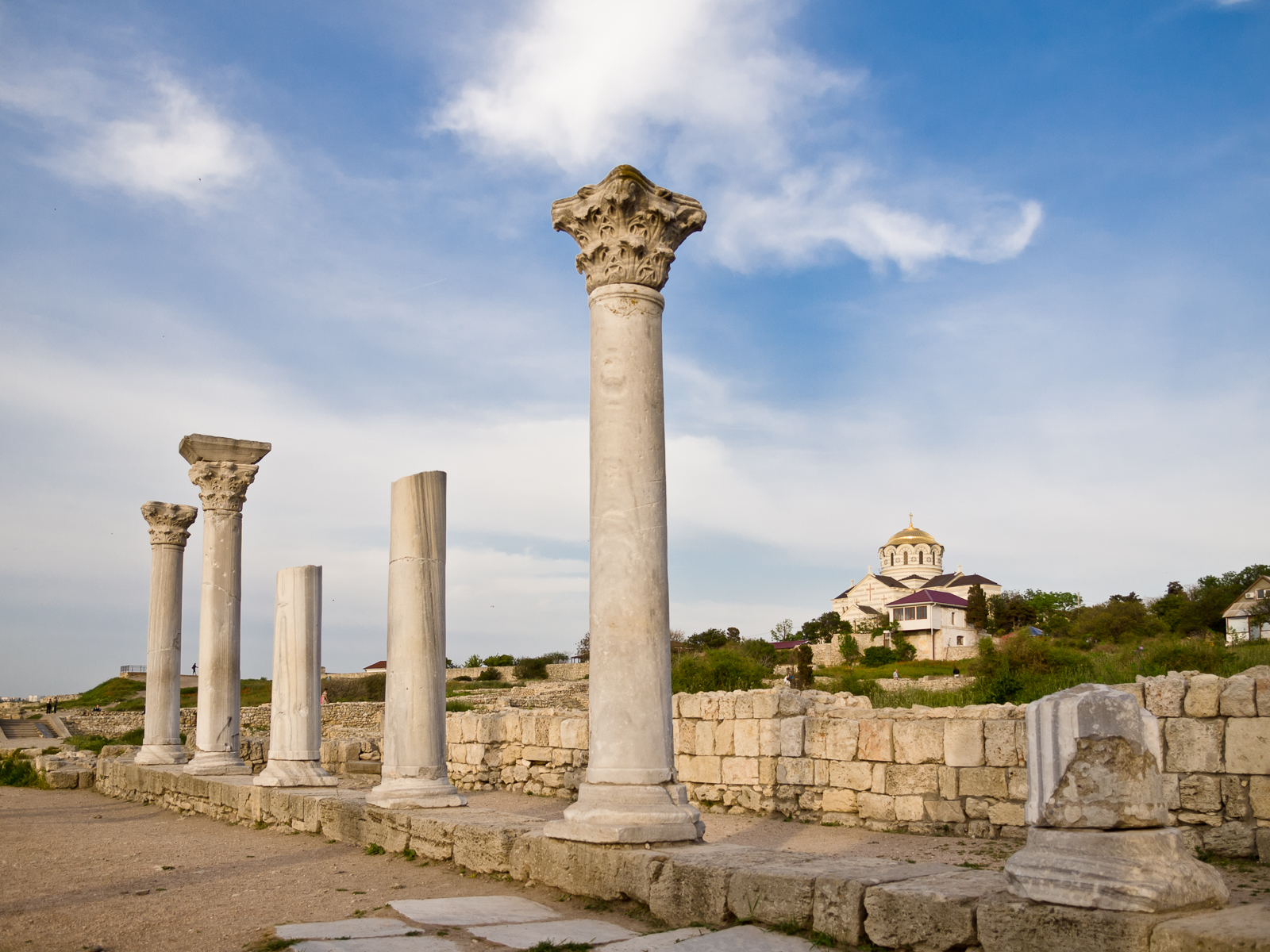 Комплекс «Стародавнє місто Херсонес-Таврійський», Севастополь, вул. Стародавня, 1